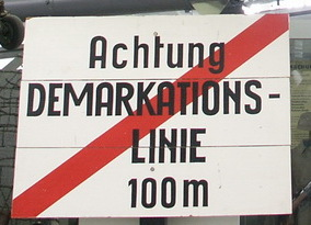 Achtung Demarkationslinie 100m